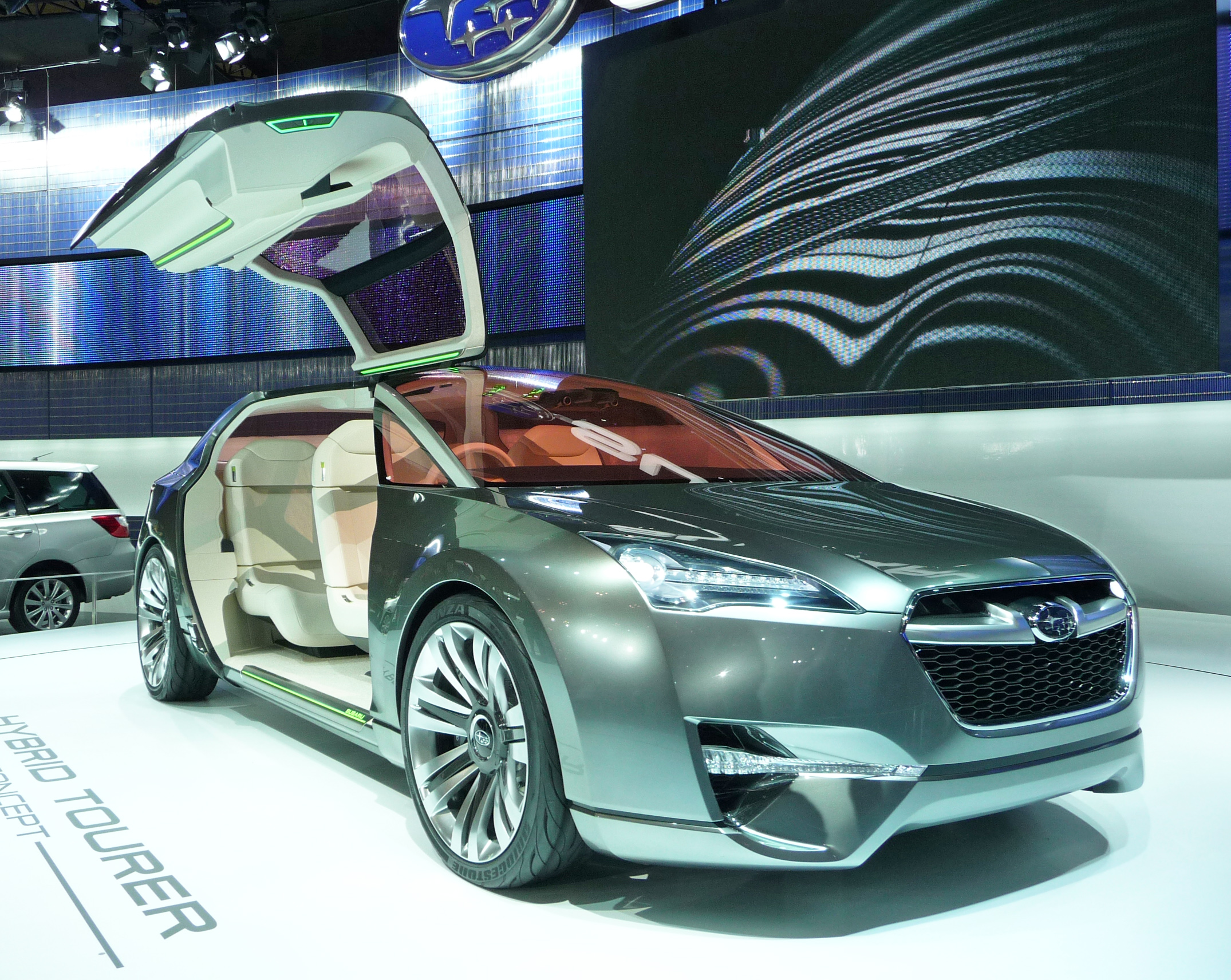 東京モーターショー2009で展示されていたスバル・ハイブリッド ツアラー コンセプト モデル